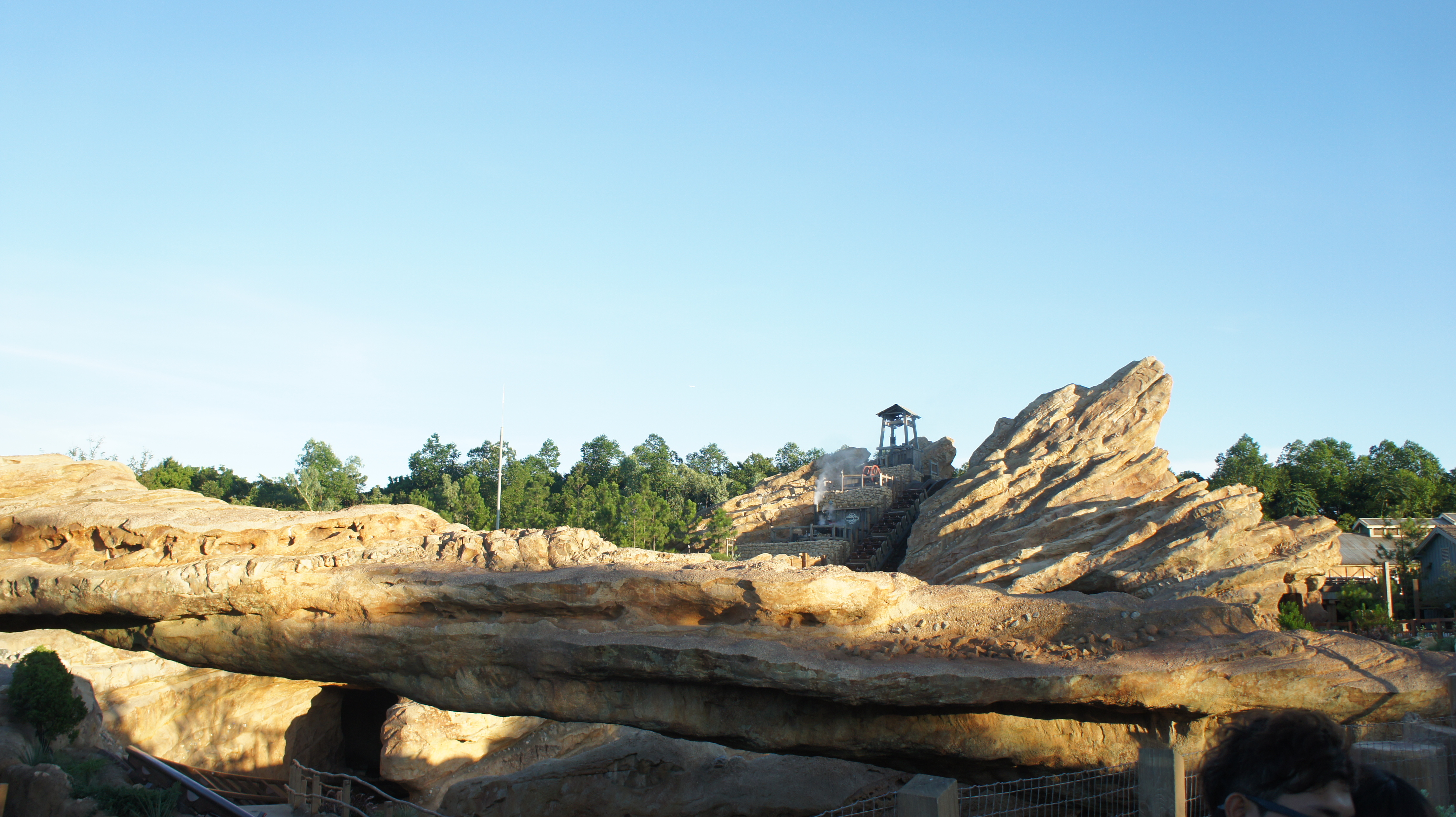 中文（香港）: 灰熊山谷主峰